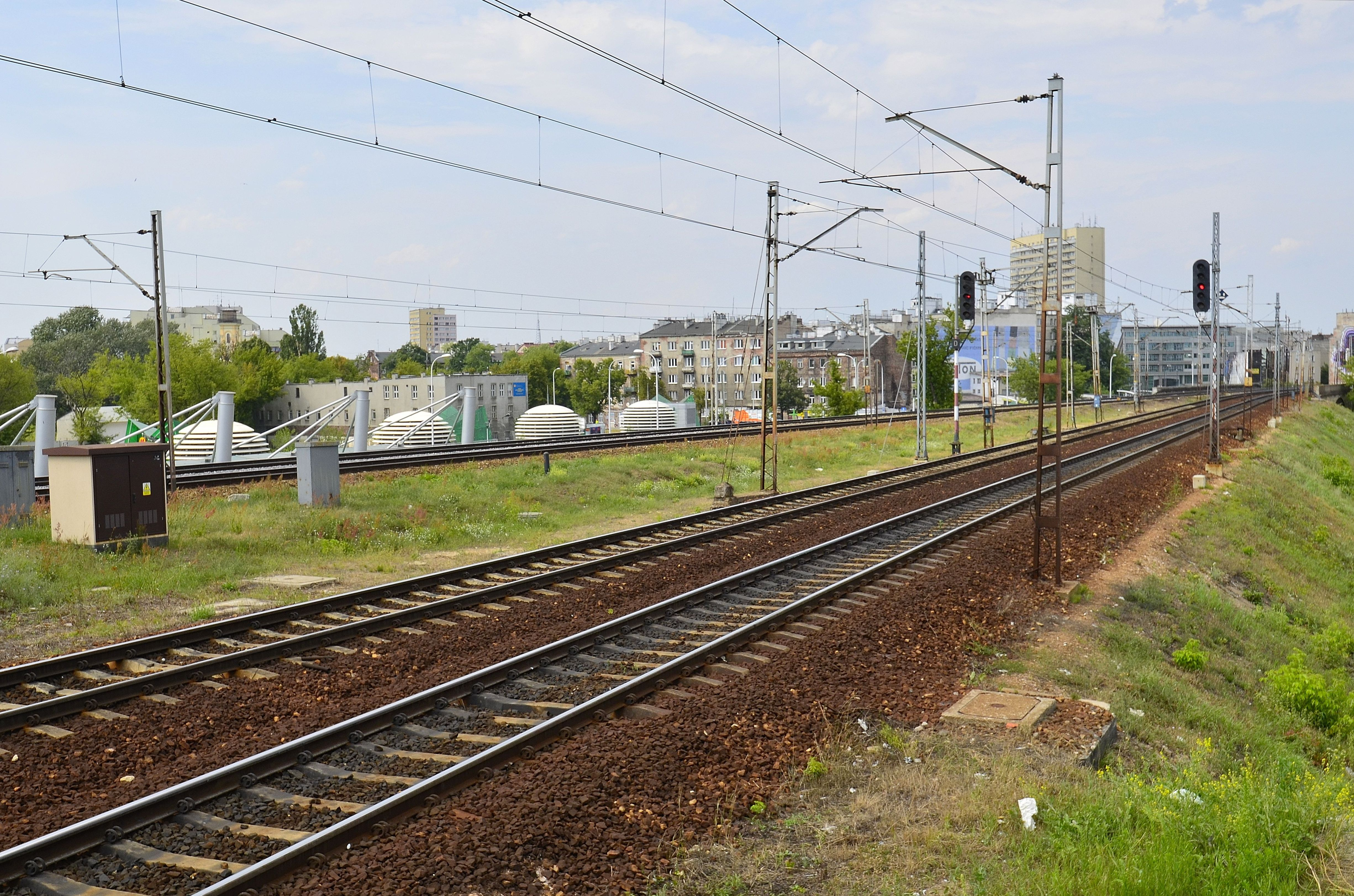 Linia średnicowa w Warszawie w pobliżu dworca Warszawa Stadion